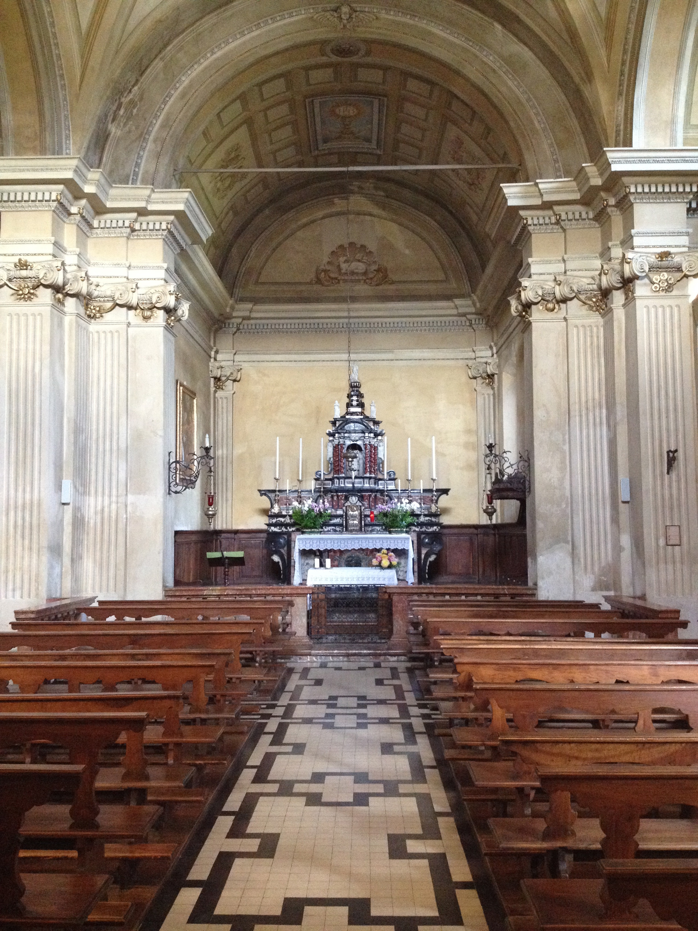 Innenansicht der Pfarrkirche San Pietro in Astano